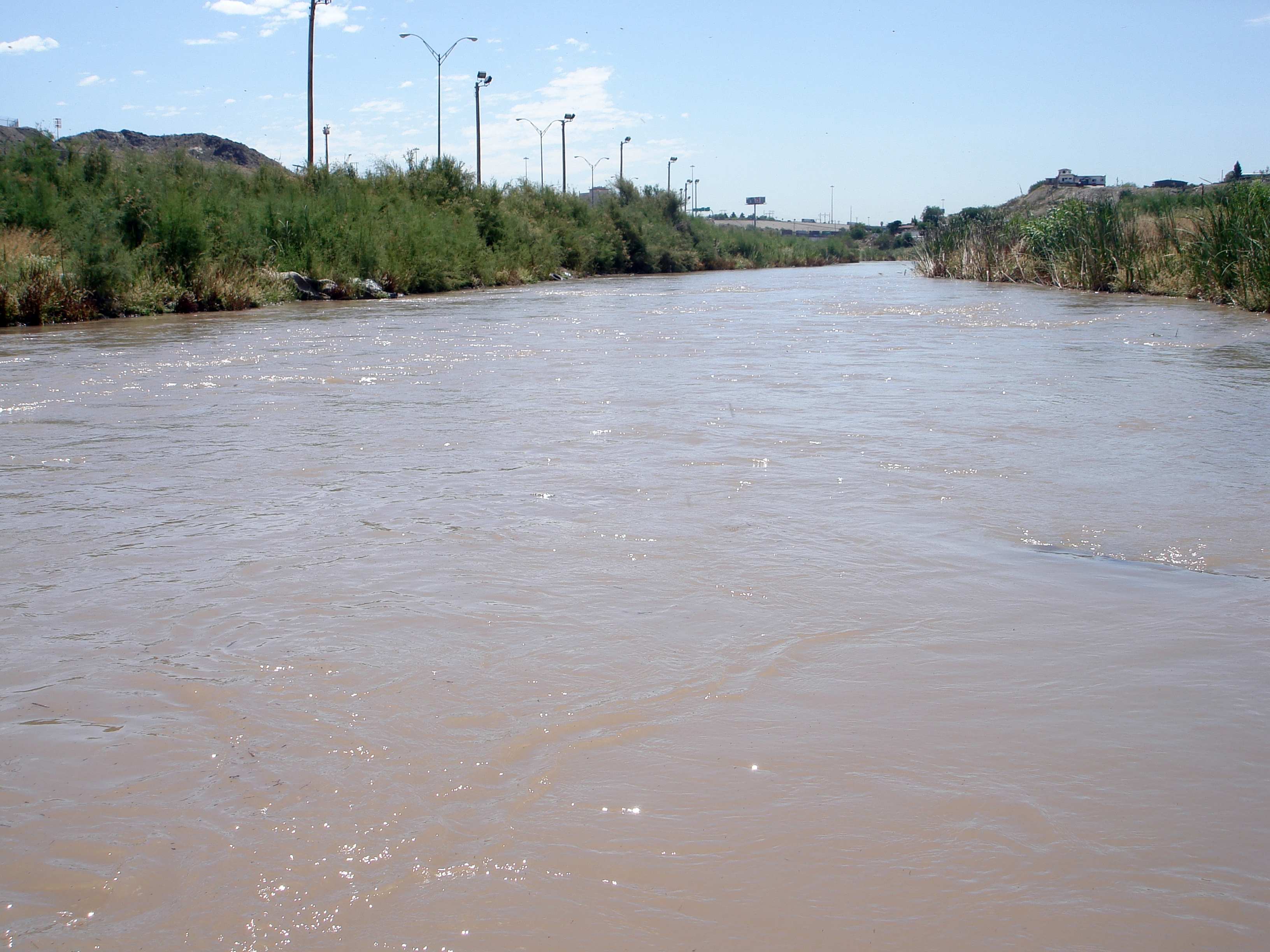 Río Bravo, frontera El Paso - Ciudad Juárez.